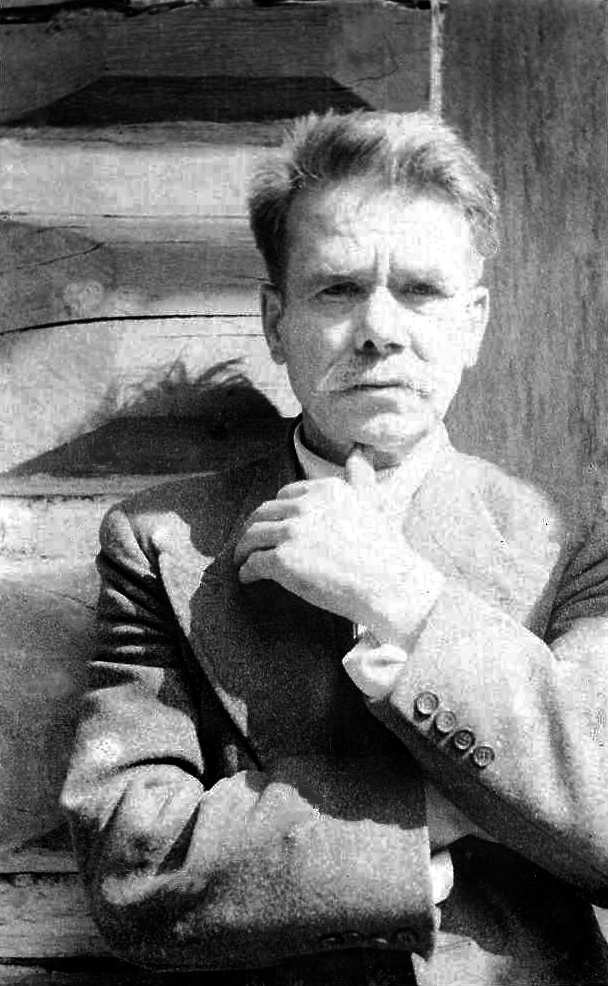 Antoni Kucharczyk (1874-1944) – poeta ludowy, podpisujący się różnymi pseudonimami.